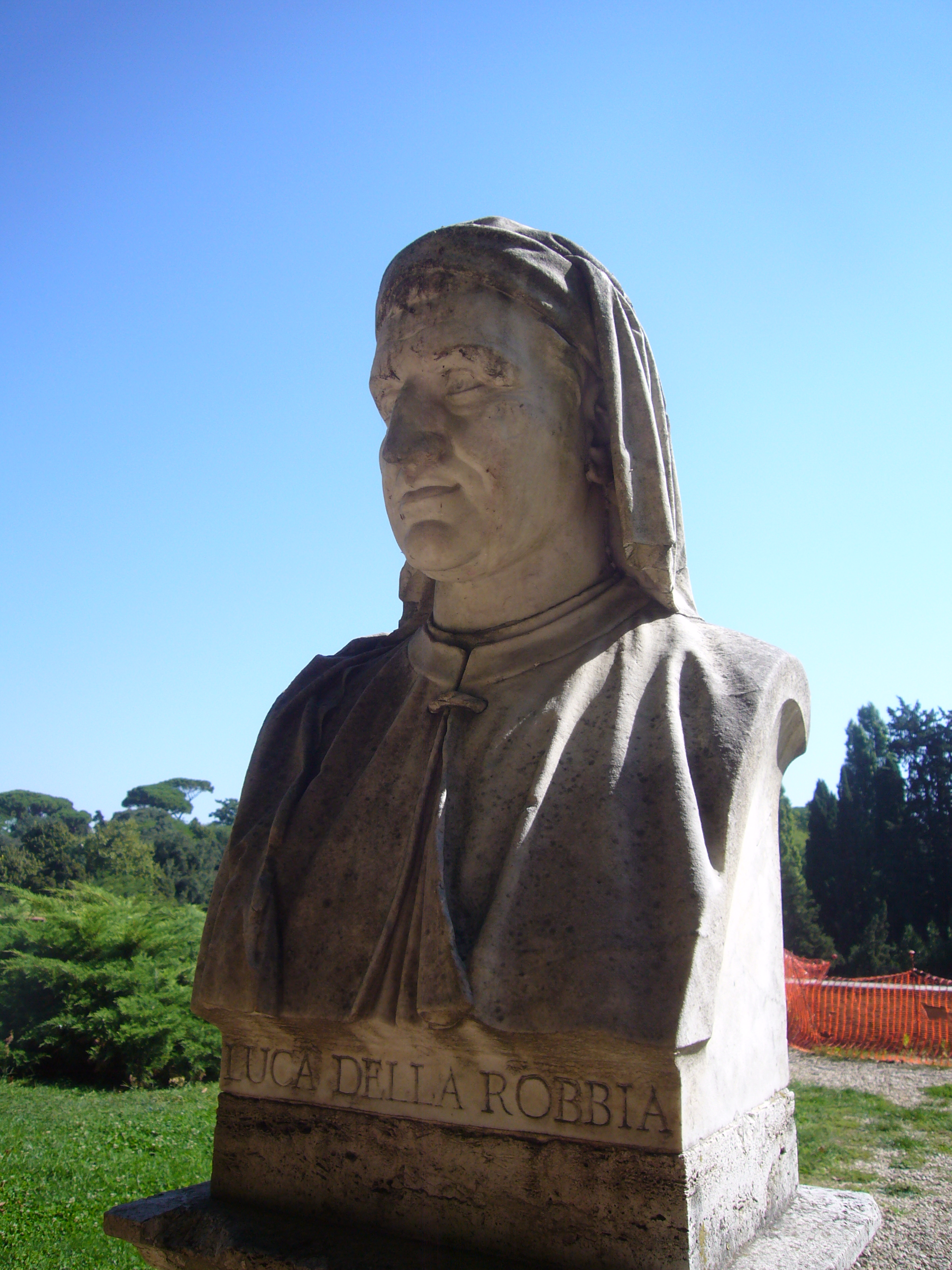 Roma, Pincio. Busto di Luca della Robbia